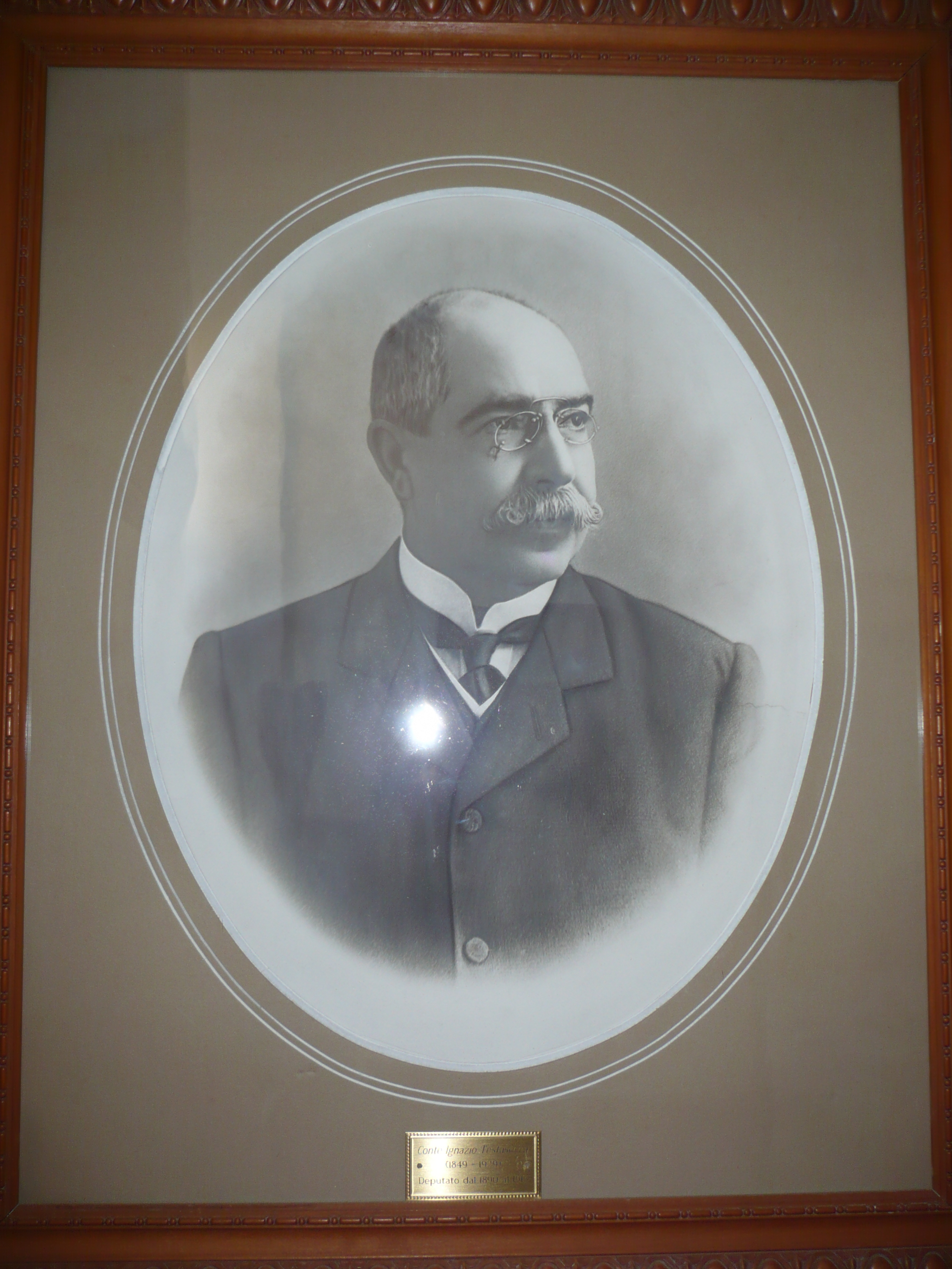 Caltanissetta - Biblioteca Scarabelli